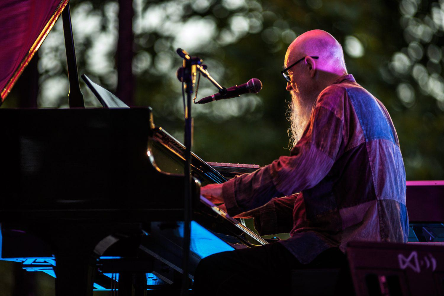 El templete del Parque de El Retiro fue escenario ayer miércoles, 8 de agosto, de un concierto de música clásica contemporánea protagonizado por dos de los intérpretes y compositores del momento: Terry Riley y su hijo Gyan, como parte de la programación del festival Veranos de la Villa.